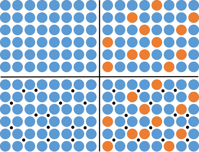 Metalliseosten eri rakenteita.